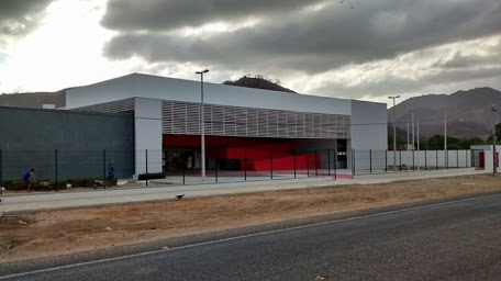 Escola Estadual de Educação Profissional Maria Auday Vasconcelos Nery